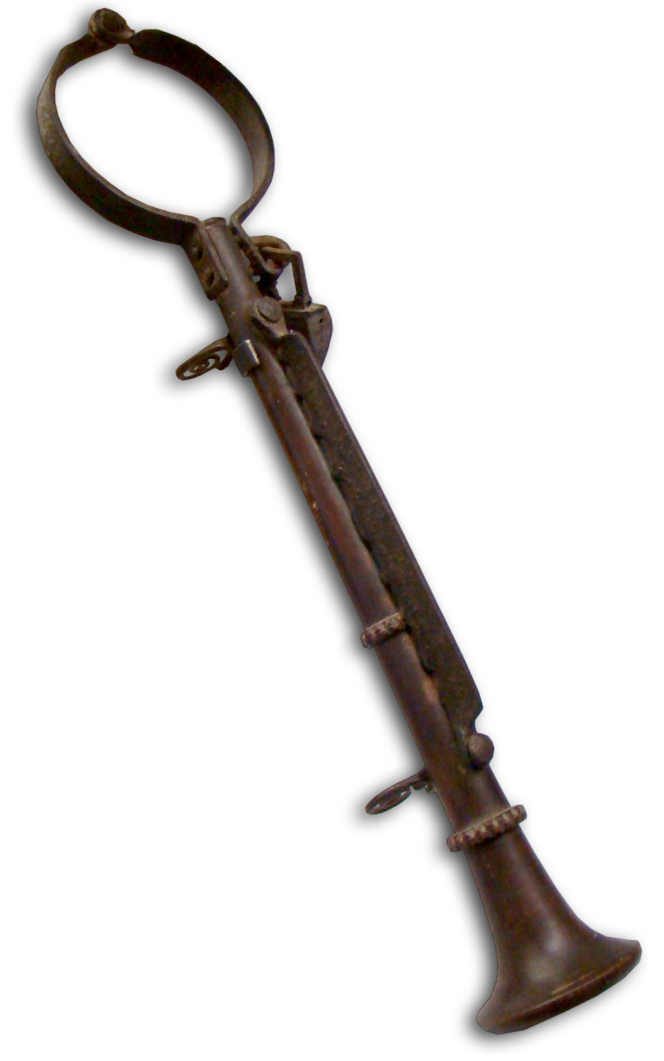 Schandflöte, spätmittelalterliche und frühneuzeitliche Ehrenstrafe